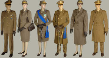 Uniformi ordinarie, esercito italiano